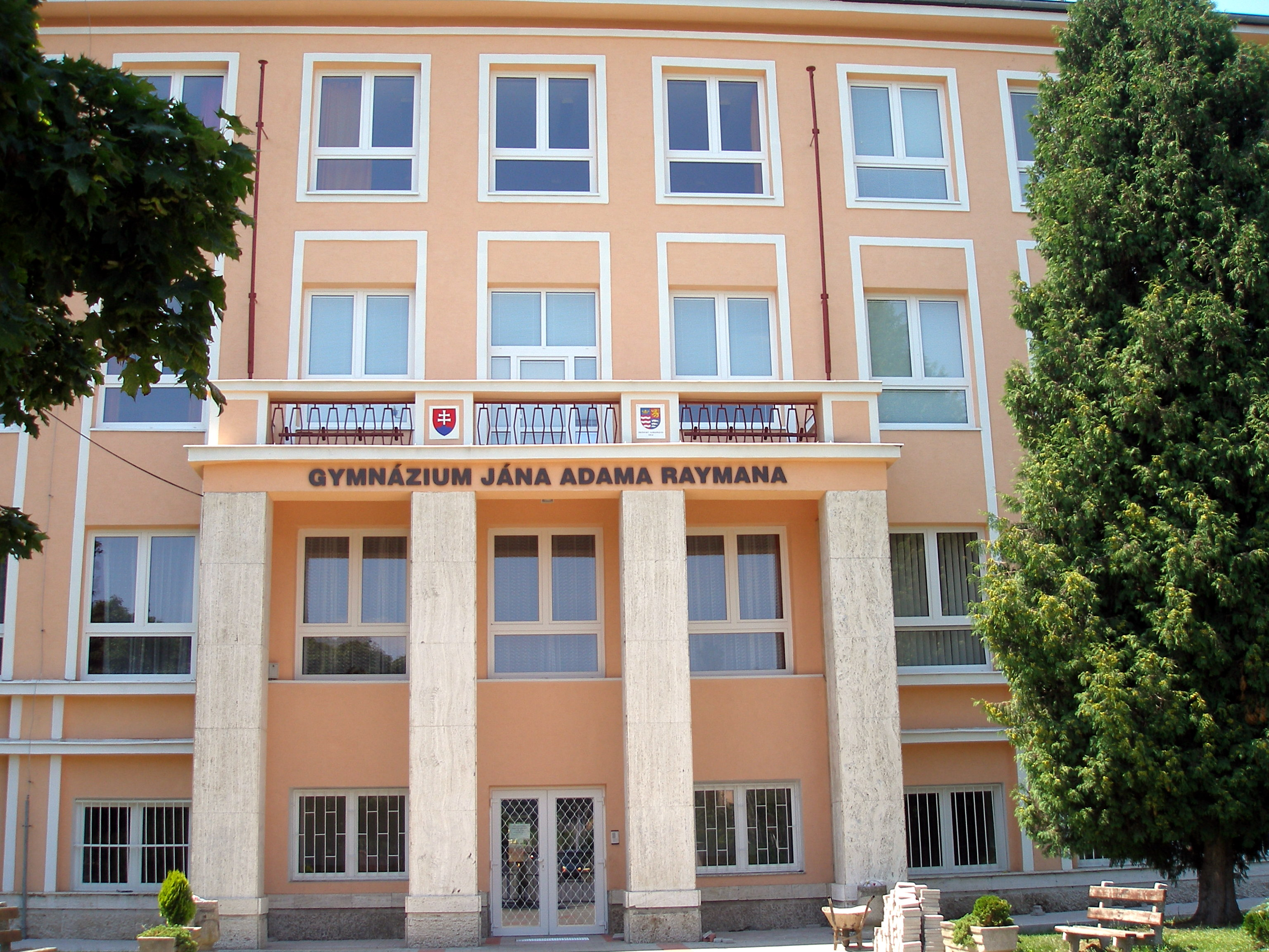 Ulica Narcisová v Prešove. Budova gymnázia J.A.Raymana.